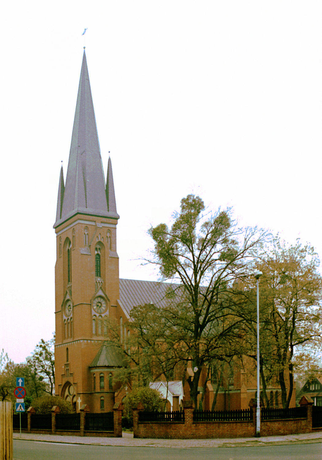 Oborniki; kościół Św. Józefa (Oborniki, Church of St. Joseph)